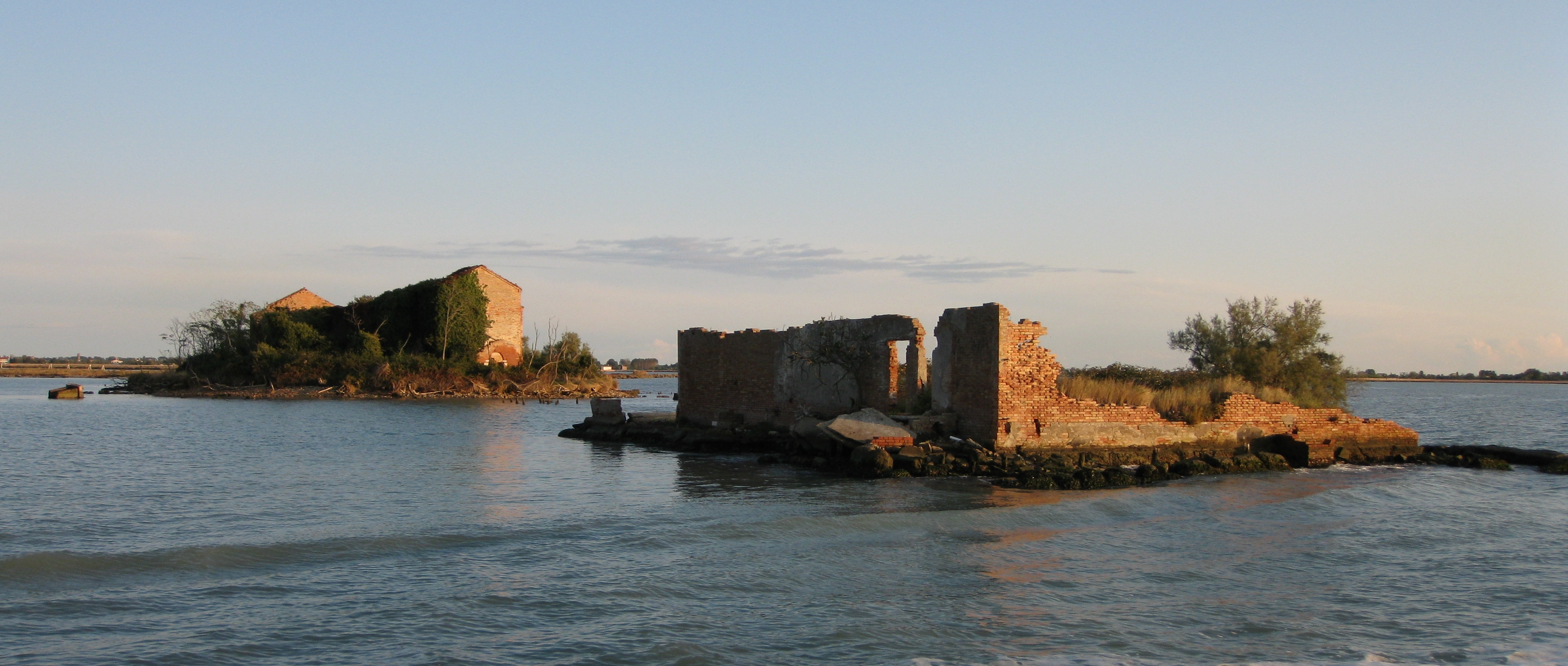 Venezia - Isola della Madonna del Monte